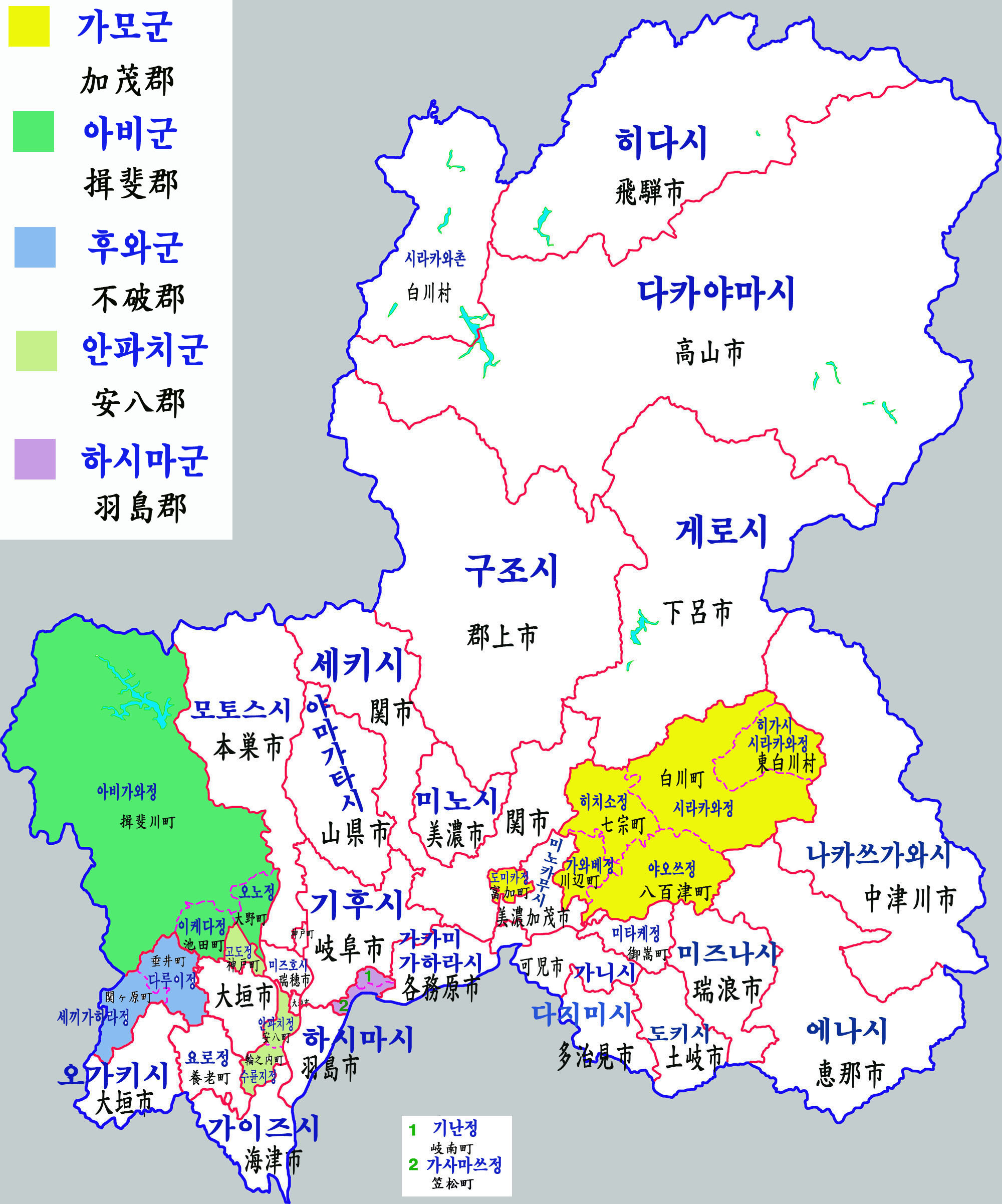 기후현 행정구역